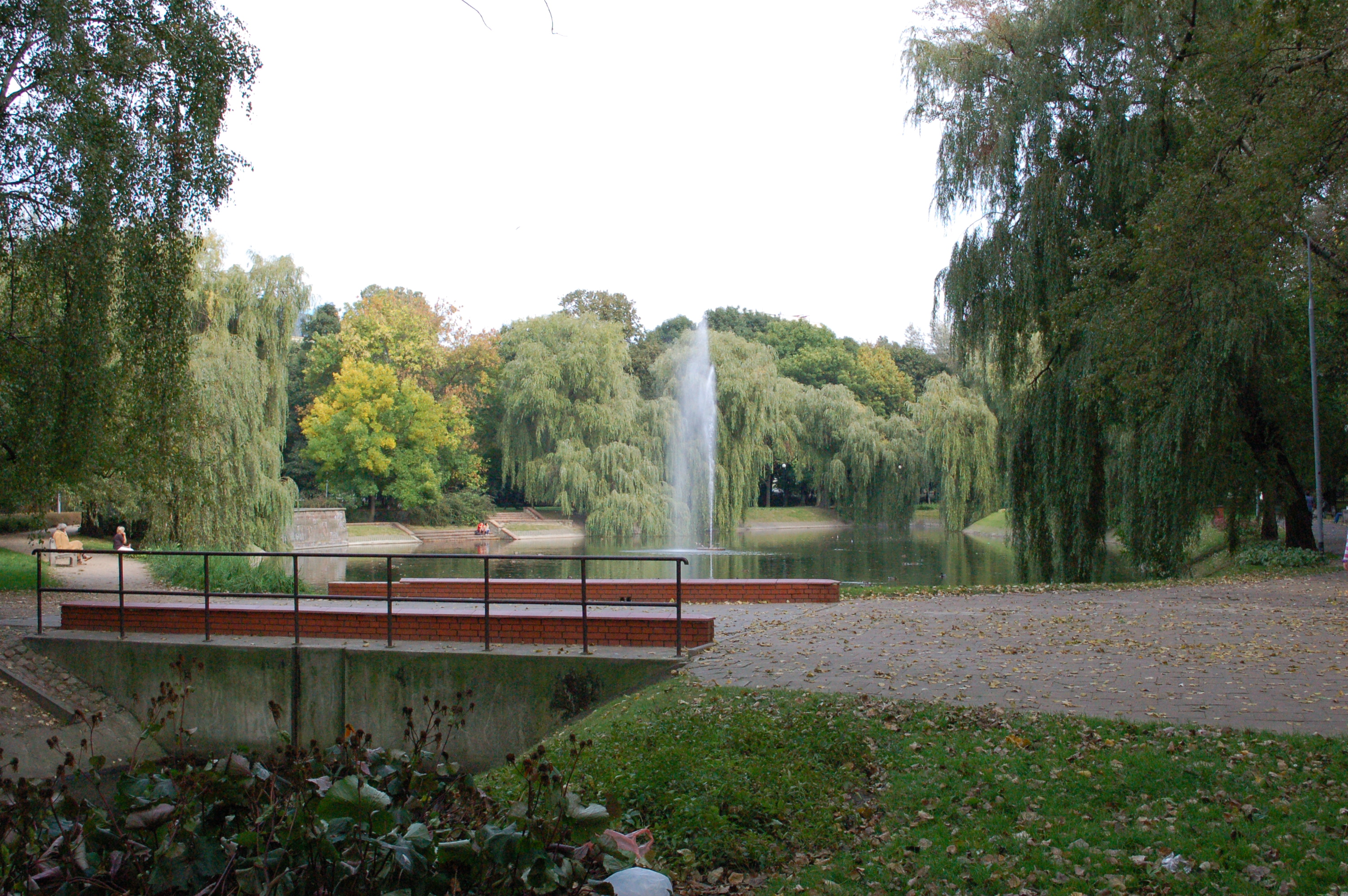 Park Morskie Oko in Warschau